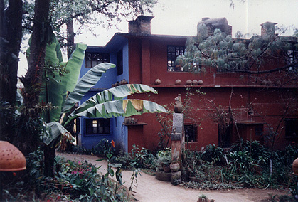 Blick aus dem Garten von Na Bolom, San Cristóbal de las Casas, Mexiko